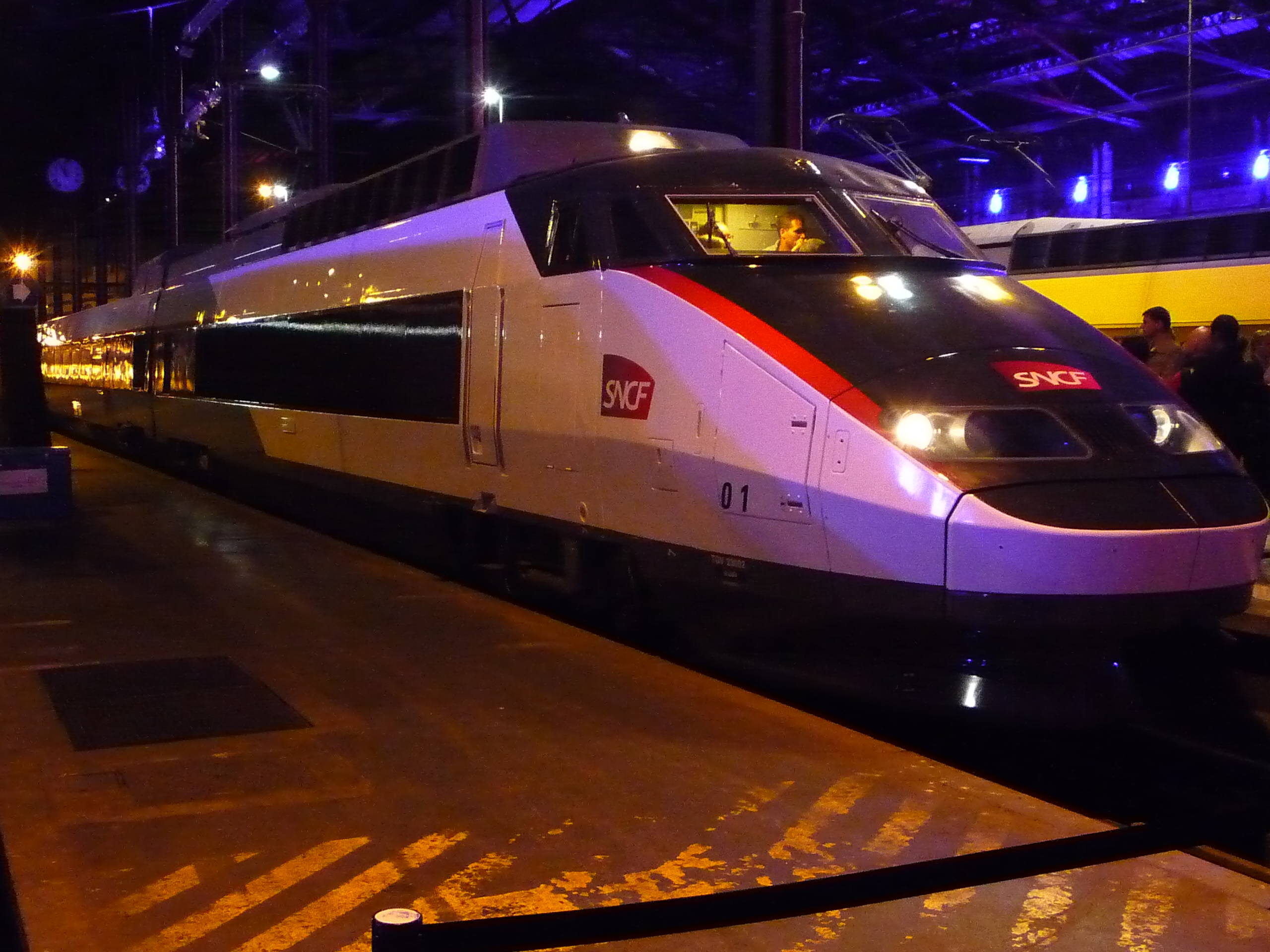 2011-09-24 | Paris Gare de Lyon, fête des 30 ans du TGV Le TGV nouvelle génération : fini le bleu, il sera à base de blanc et de gris anthracite. Les portes seront carmillon. En fait ça me fait beaucoup penser aux Z50000 en livrée « Stif » sur le réseau régional francilien. Mais l'effet est assez réussi, plutôt sobre dans son genre. (100L5652)